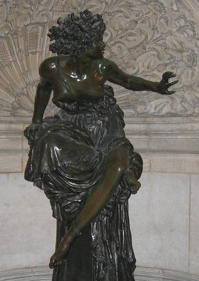 Pythia, 1870, Statue von Marcello (eigentlich Adèle d'Affry, Duchesse de Castiglione-Colonna) in der Pariser Oper